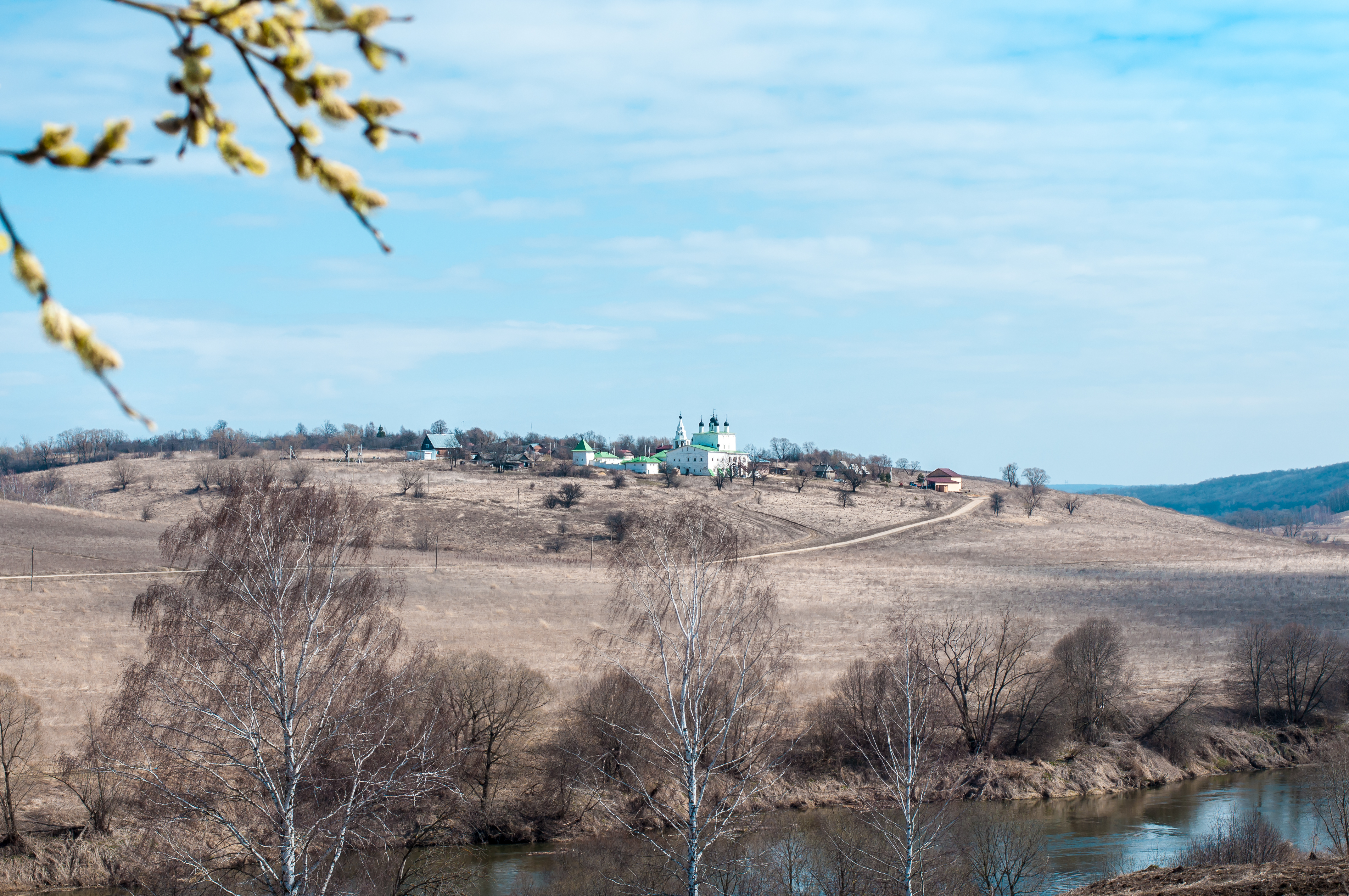 Монастырь Богородице-Рождественский Анастасов: Анастасово, Одоевский район, Тульская область